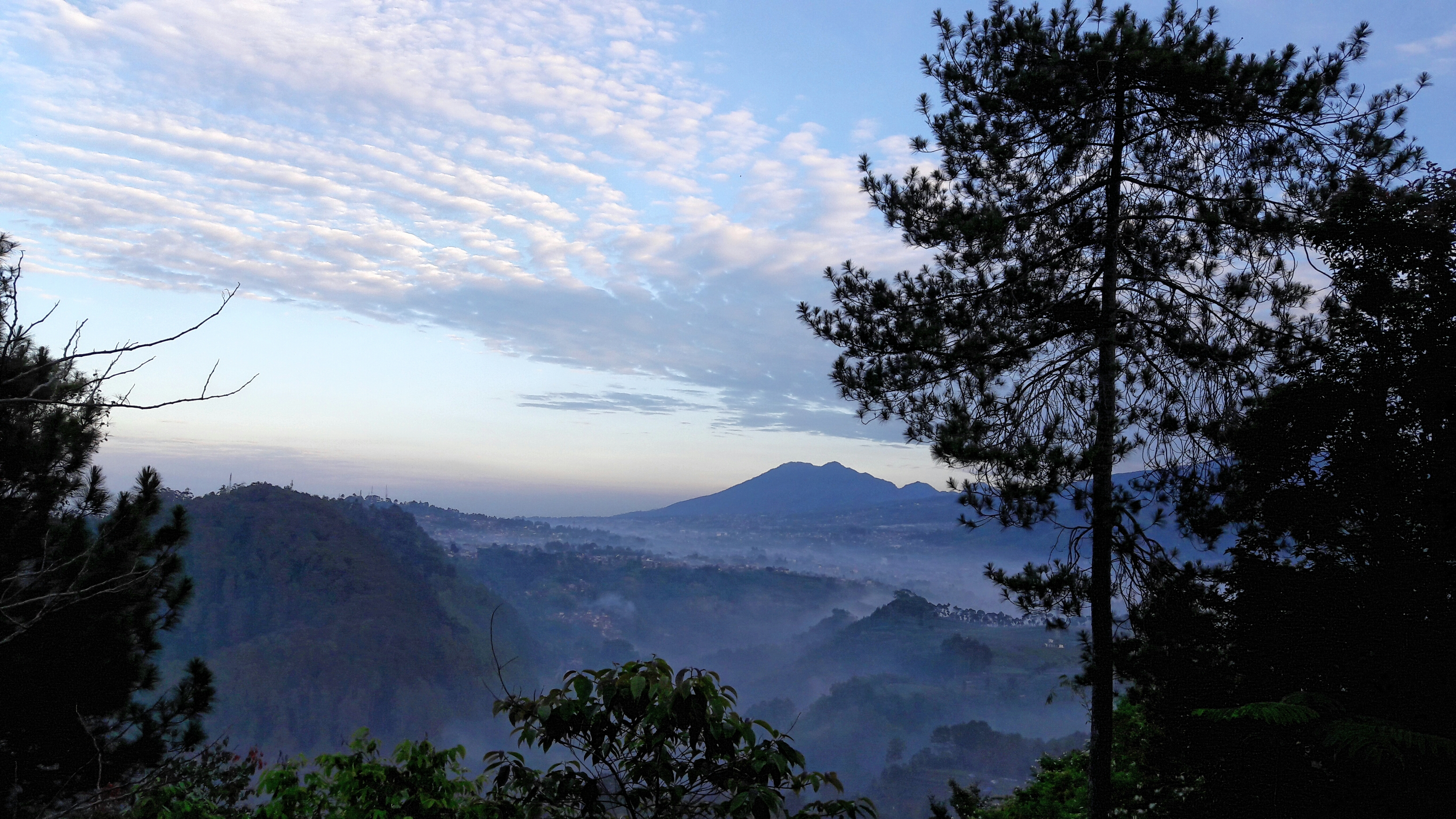 Tebing Keraton atau nama lain Tebing Karaton yang artinya Kemegahan Alam. Tebing ini terletak di Kampung Ciharegem Puncak, Desa Ciburial, Bandung. Letaknya dari kota Bandung menuju ke Tebing Keraton menempuh waktu hingga 37 menit (11 Km) roda empat. Roda 2 lebih cepat dari perkiraan waktu. Ketinggian Tebing Keraton yang berada tepat di daerah Dago Pakar ini sekitar 1200 mdpl.